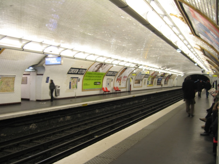 Station Corentin Celton sur la ligne 12 du métro de Paris